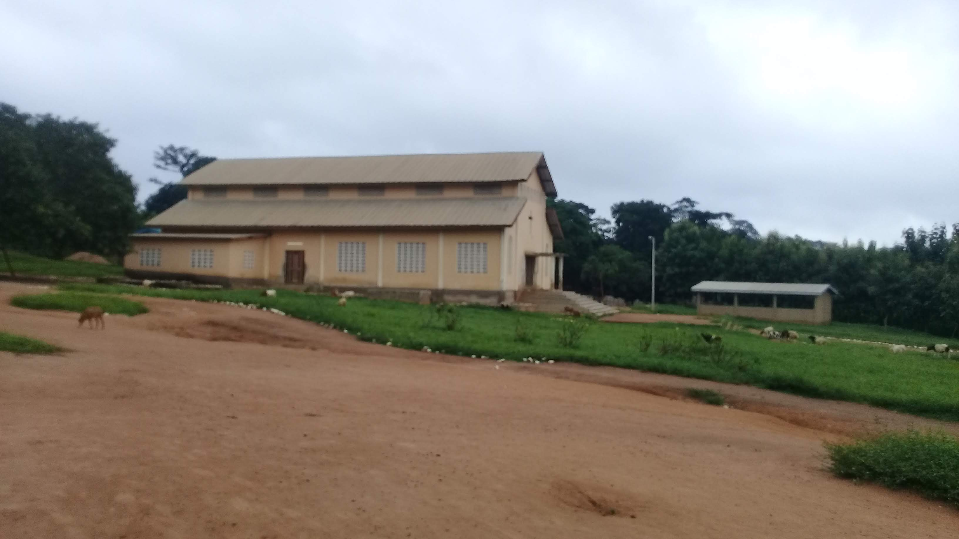 Torossanguéhi est une localité du nord-est de la Côte d'Ivoire